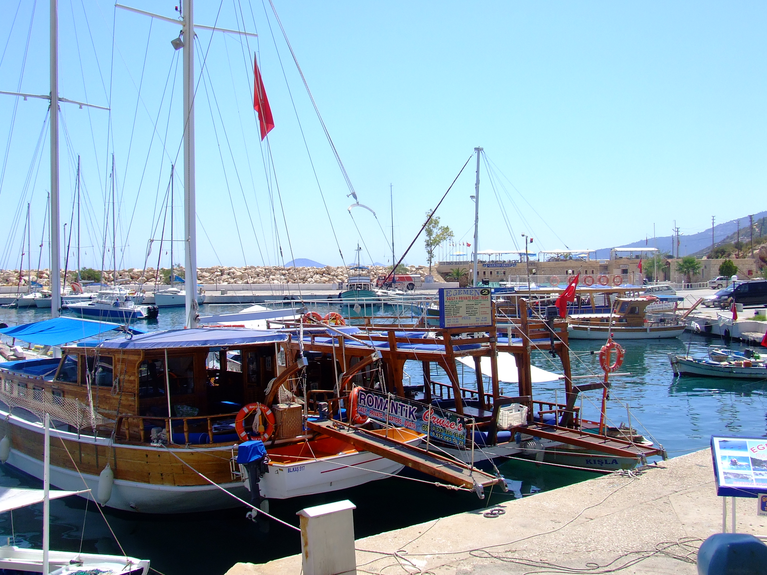 Harbour in Kalkan Turkey